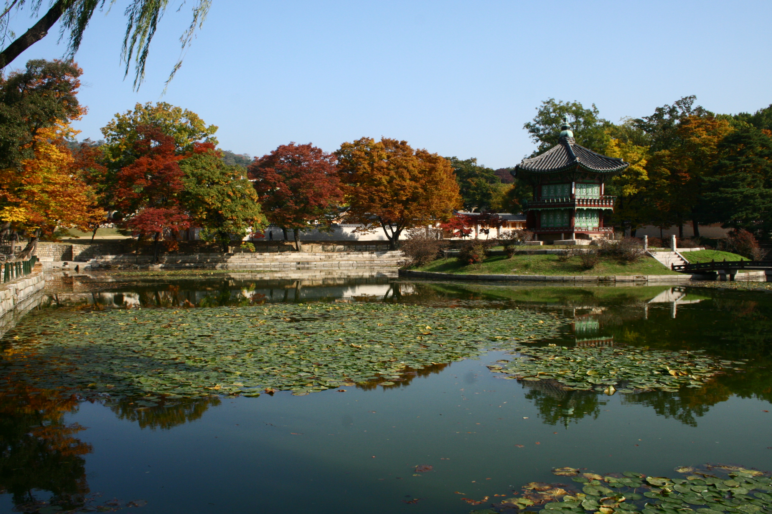 Hyangwonjeong in Gyeongbokgung Palace, Seoul, South Korea